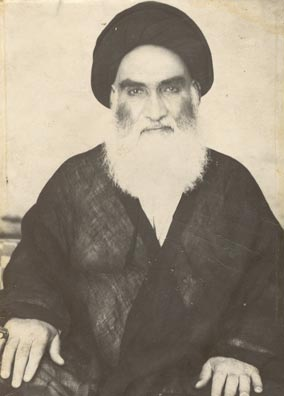 المرجع السيد مهدي الحسيني الشيرازي